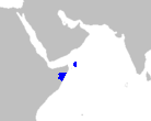 Mapa areala familije Dirachmaceae